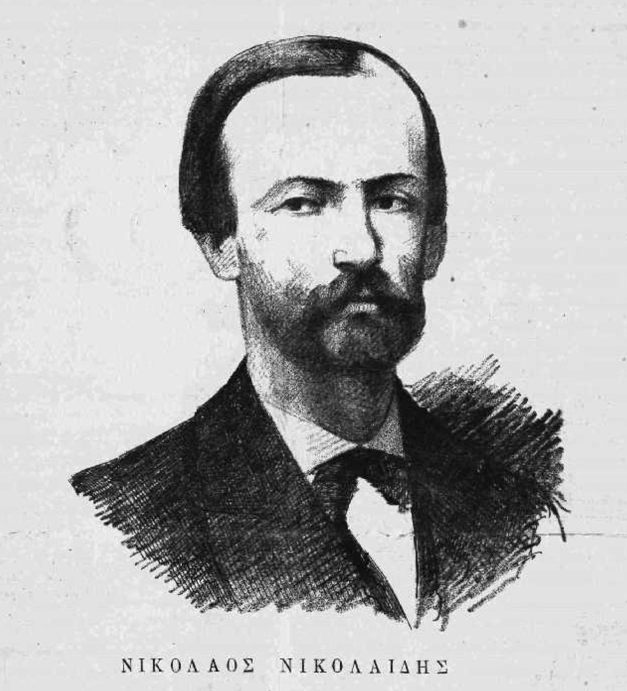 griechischer Universitätsprofessor, 19. Jahrhundert